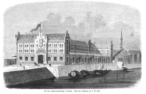 Die neue Zollvereinsniederlage in Bremen, seltener Holzstich nach F. W. Kohl aus einer Zeitschrift bzw. einem Buch von 1860 mit rückseitigem Text, Bildabmessungen etwa 155×240mm.